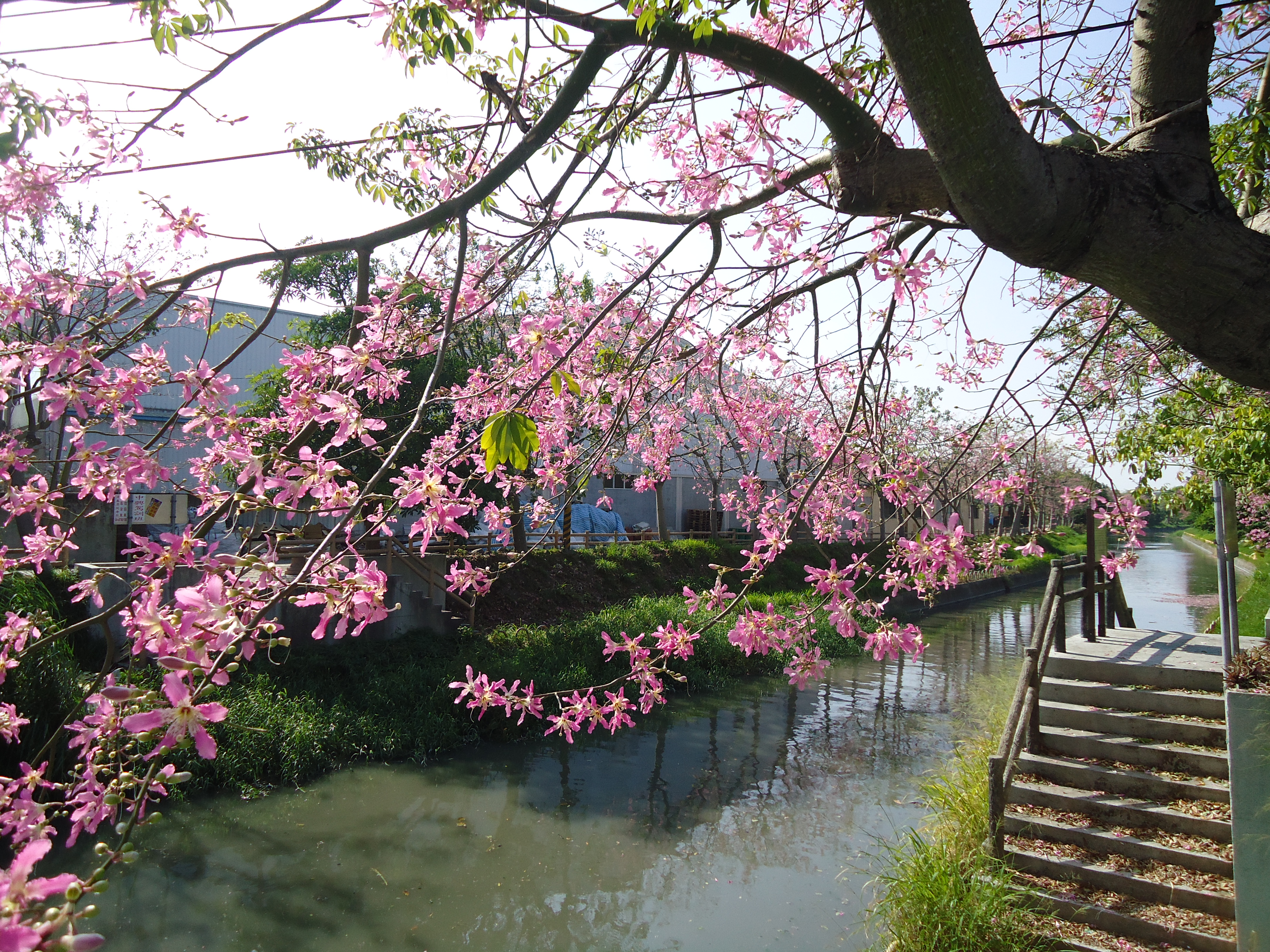 北斗河濱公園 美人樹 Floss-silk Tree at Beidou Riverside Park